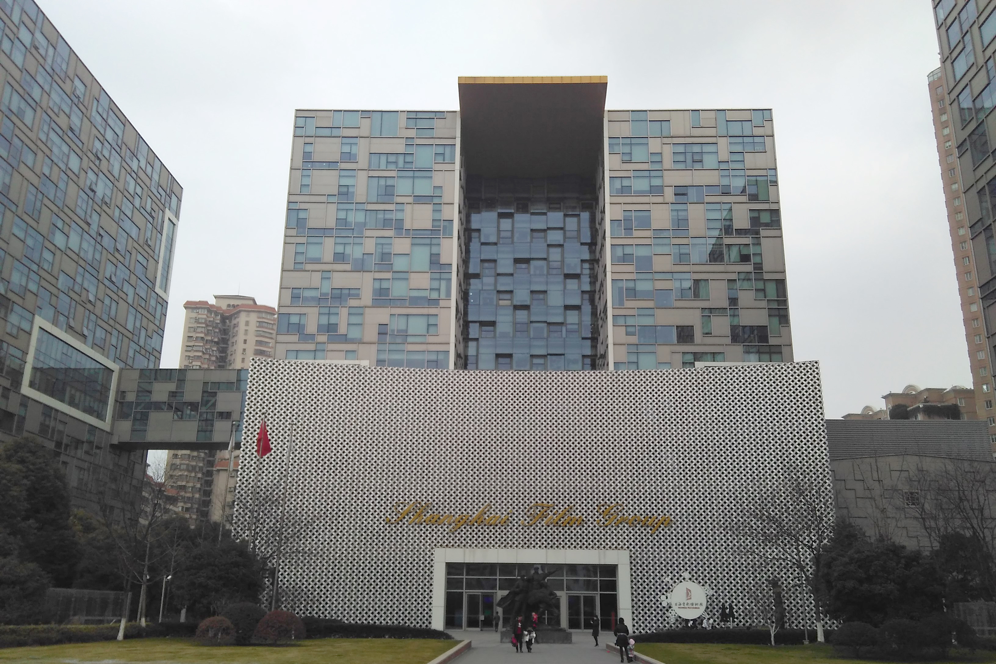 中文（中国大陆）: 上海电影博物馆